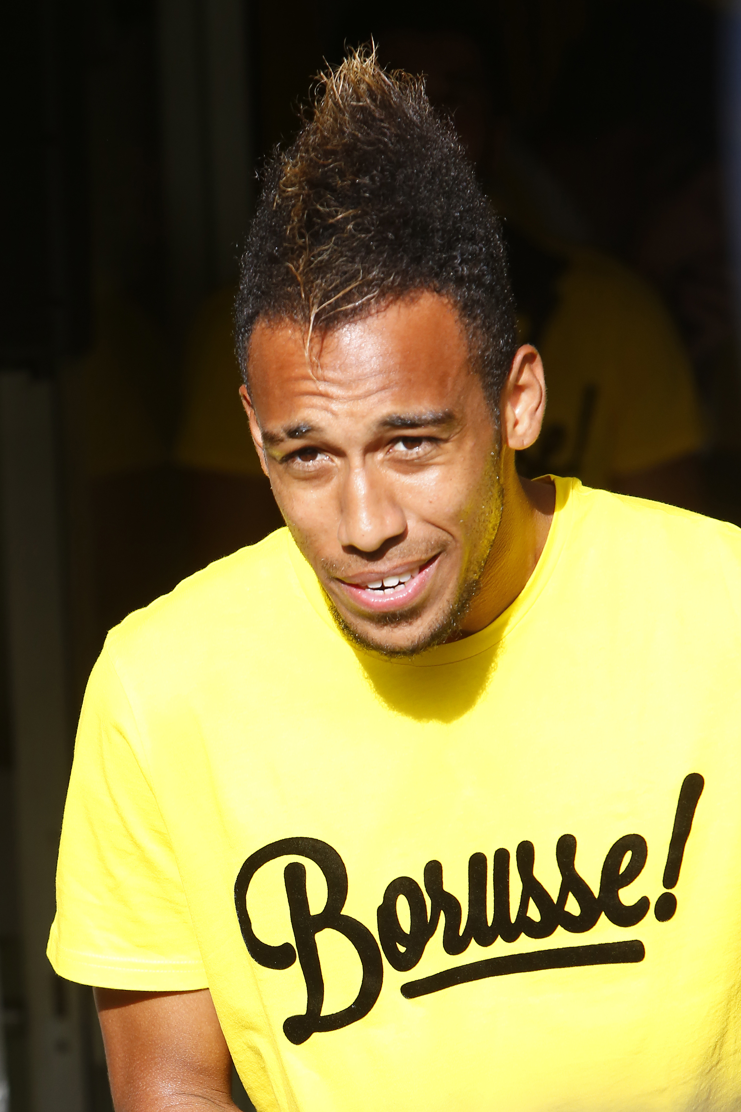 Pierre-Emerick Aubameyang bei der Mannschaftsvorstellung von Borussia Dortmund am 09.08.2014 im Signal Iduna Park